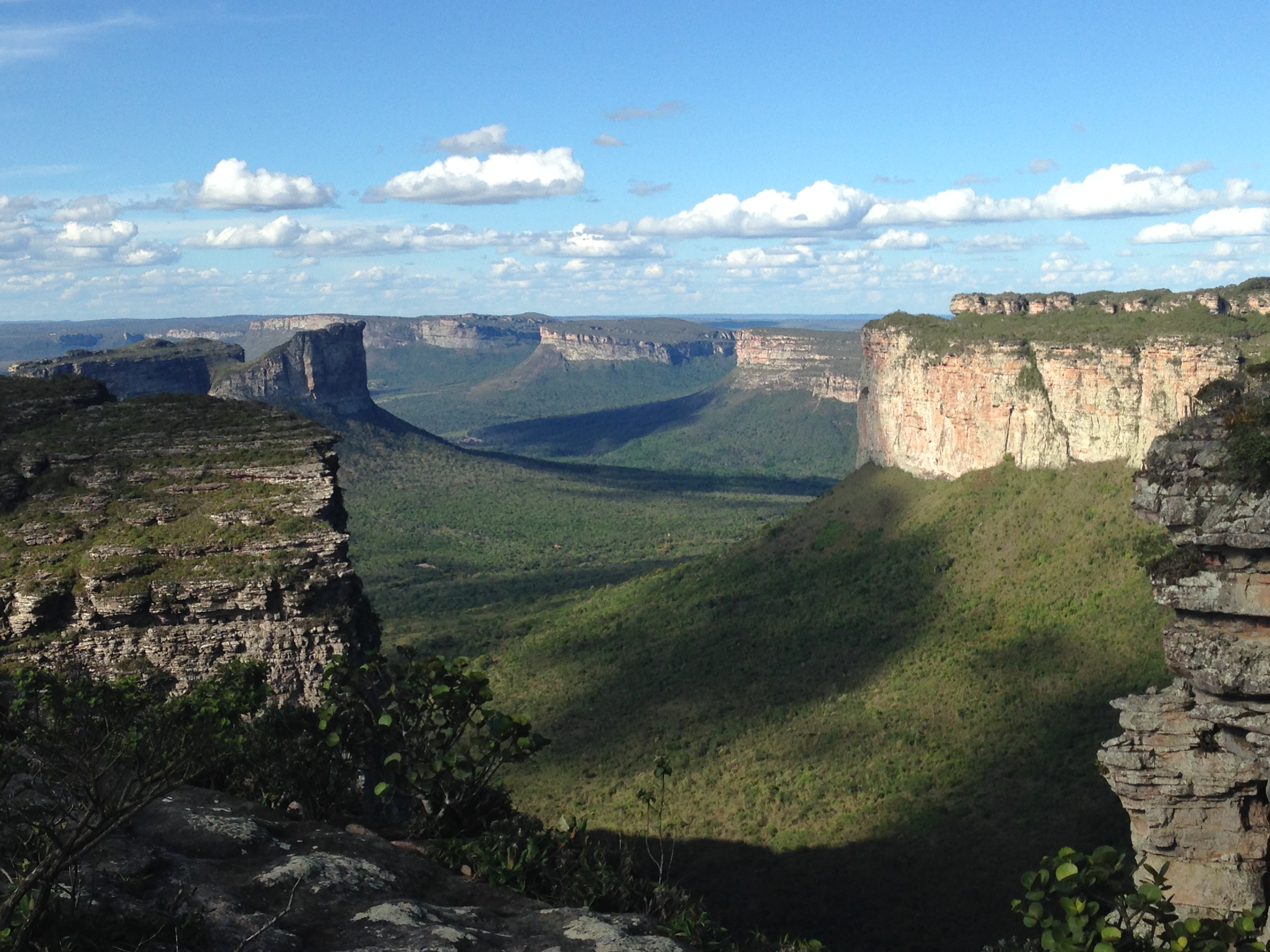 Parque Nacional da Chapada Diamantina, um dos lugares mais belos e intocados do Brasil.